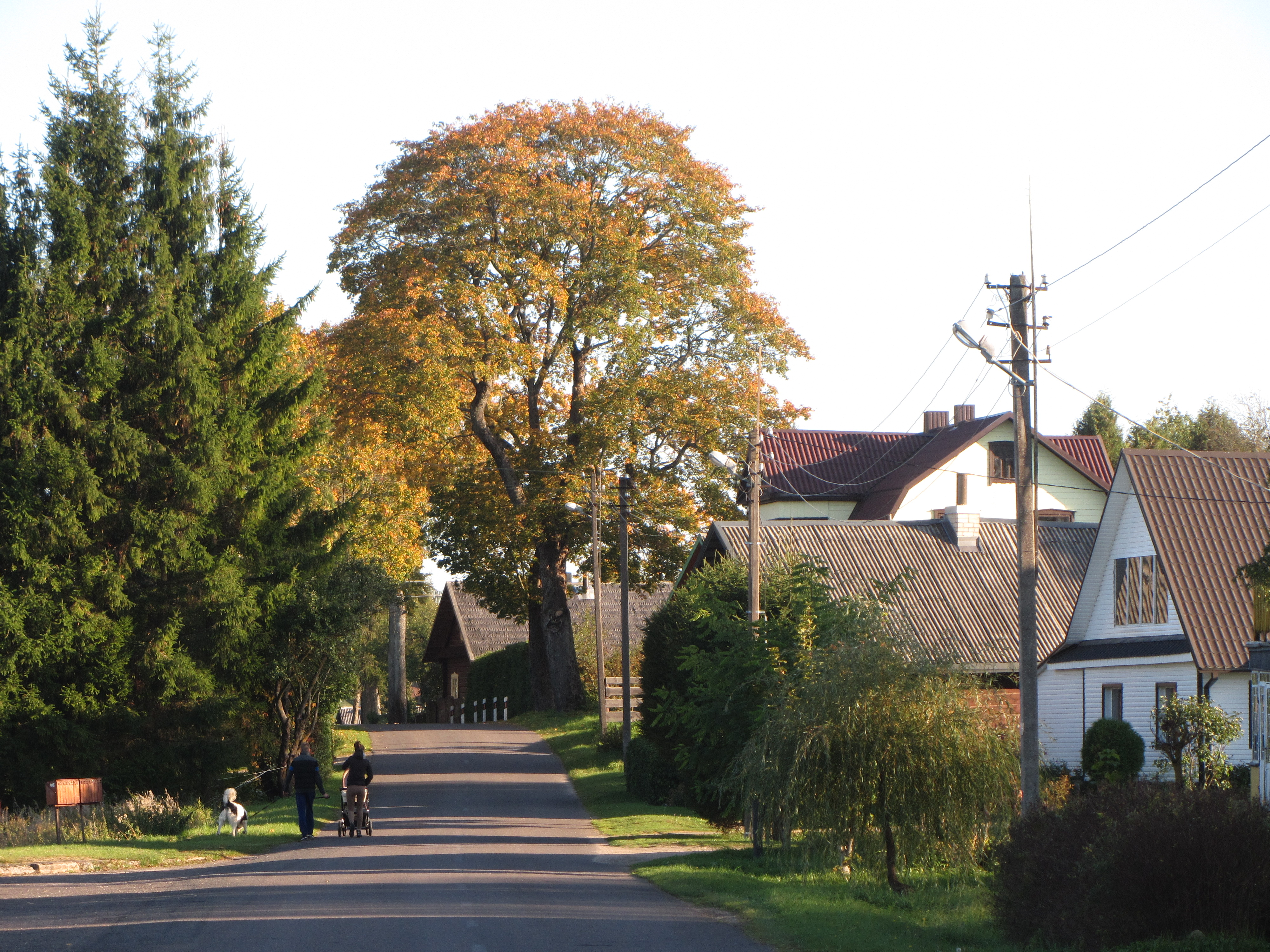 Kirdeikiai, Lithuania